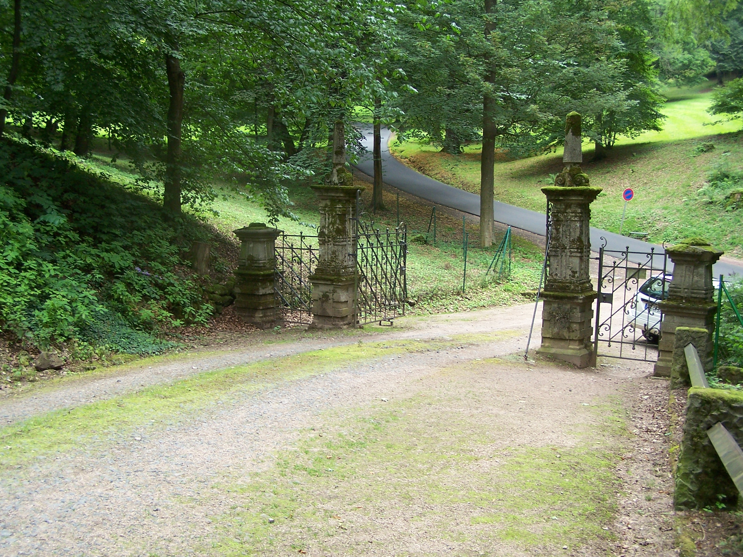 Das sogenannte Obeliskentor an der Hauptzufahrt zum Schloss Altenstein.